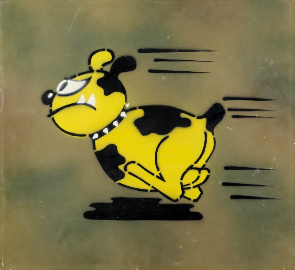 Divisionsemblem för Ivar Blå, den andra divisionen vid Göta flygflottilj (F 9), valde en amerikansk inspirerad tecknad hund som sin divisionssymbol. Till en början försåg man flygplanen med denna hund som snabbt fick namnet Bonzo. På flygplanen var Bonzo enligt uppgift målad i gult, men den före detta Fältflygaren på F 9 (flög på samtliga divisioner) på flyghjälmarna kom att måla Bonzo i blå färg. Bonzo levde vidare efter flottiljens nedläggning och då var ett märke för Säve Basen under först F 7 och sedan F 10 förvaltning.